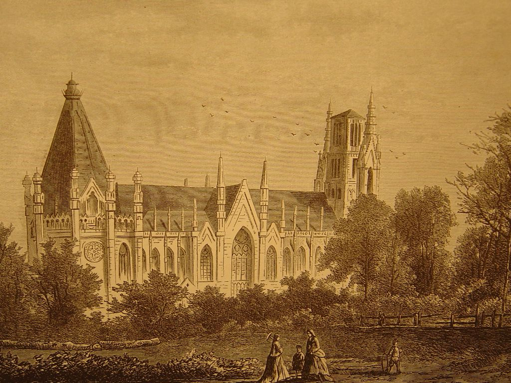 L"église de Laken (Bruxelles ) par Ch. Trumper